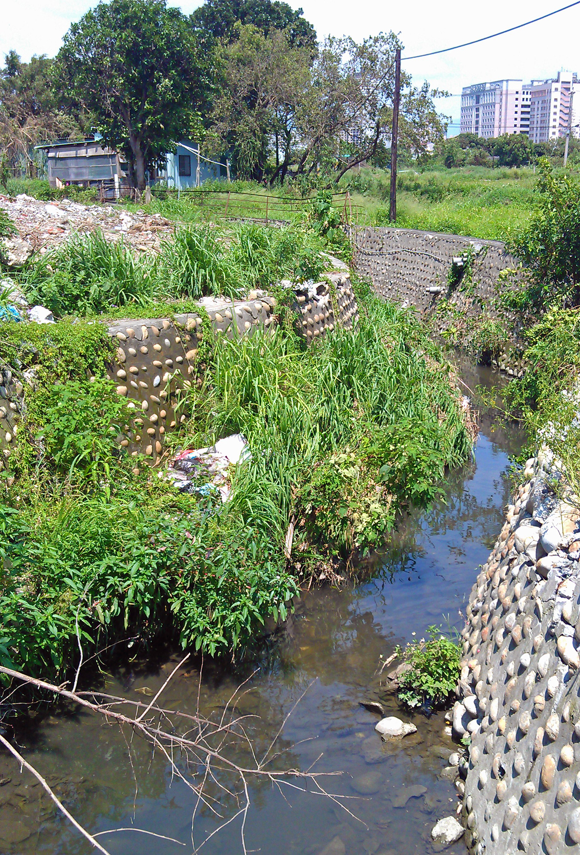 南屯區舊南屯溪